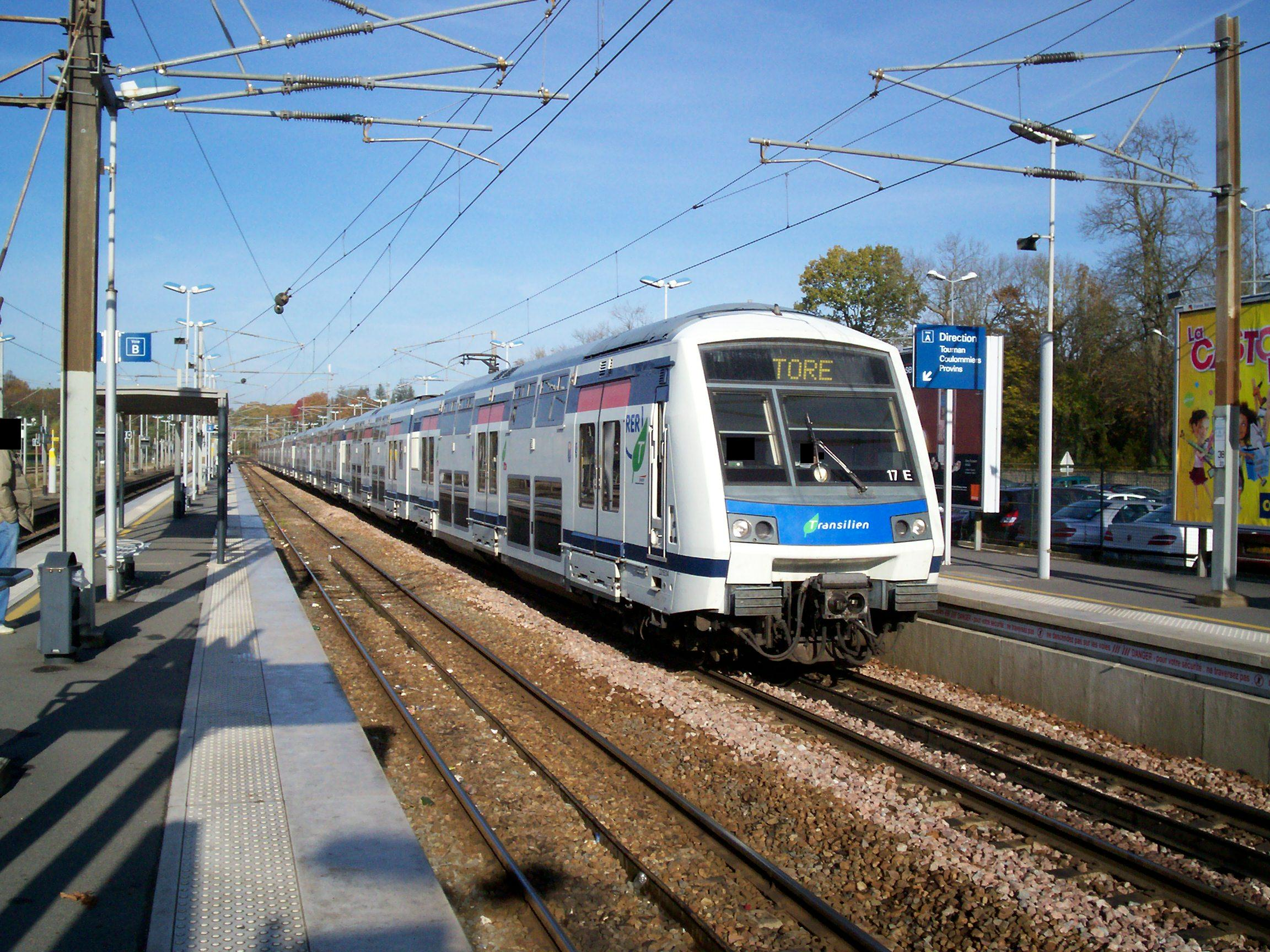 Rame Z22500 assurant la mission TORE à Gretz-Armainvilliers